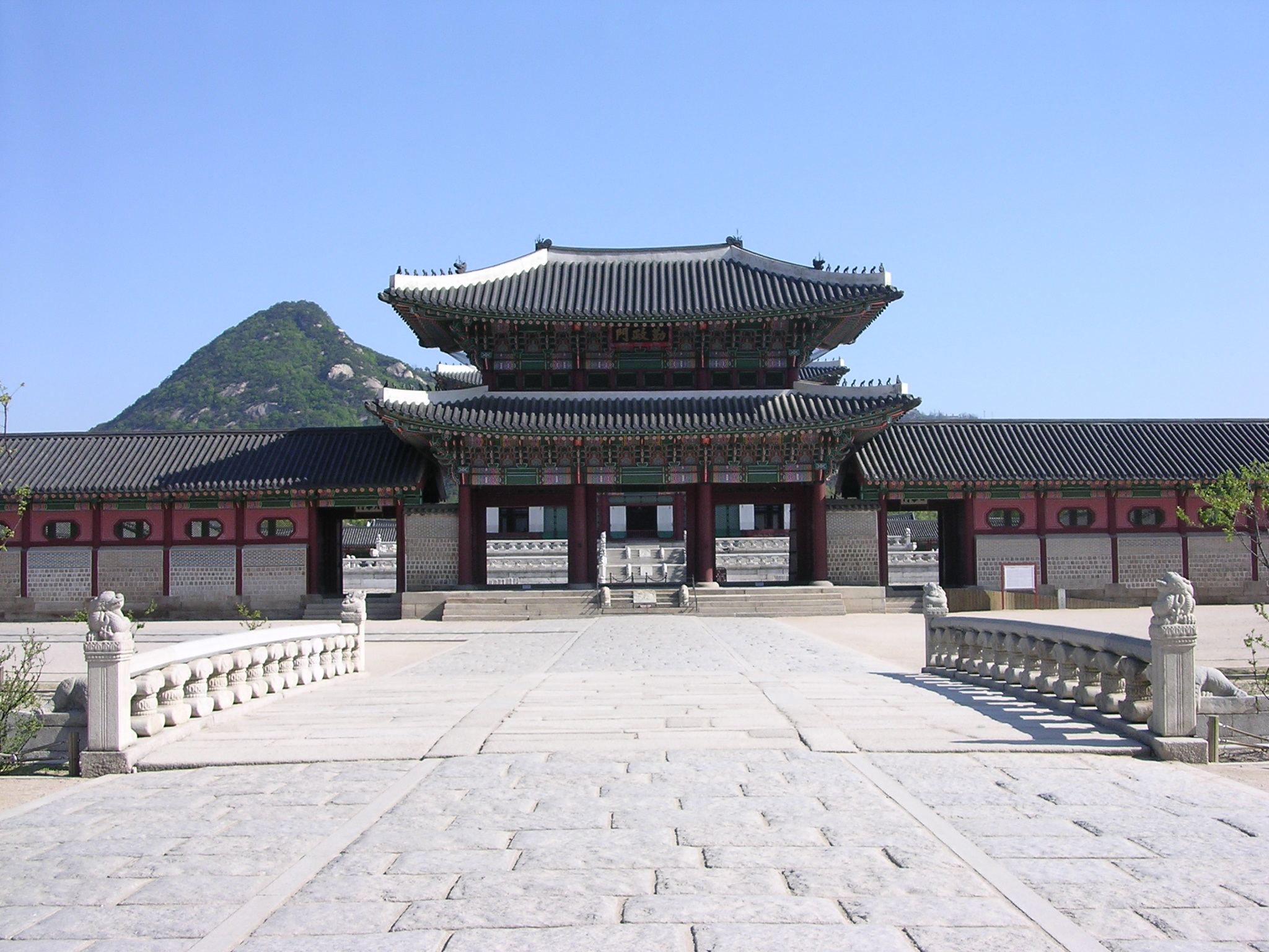 KeunJeongMun (gate) in Gyeongbokgung, Seoul.